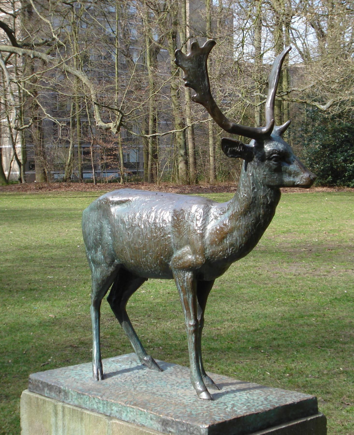 Den Haag, park achter Oostduinlaan. Kunstwerk "Edelhert" van Kees de Kruijff uit 1949. Den Haag/The Netherlands.